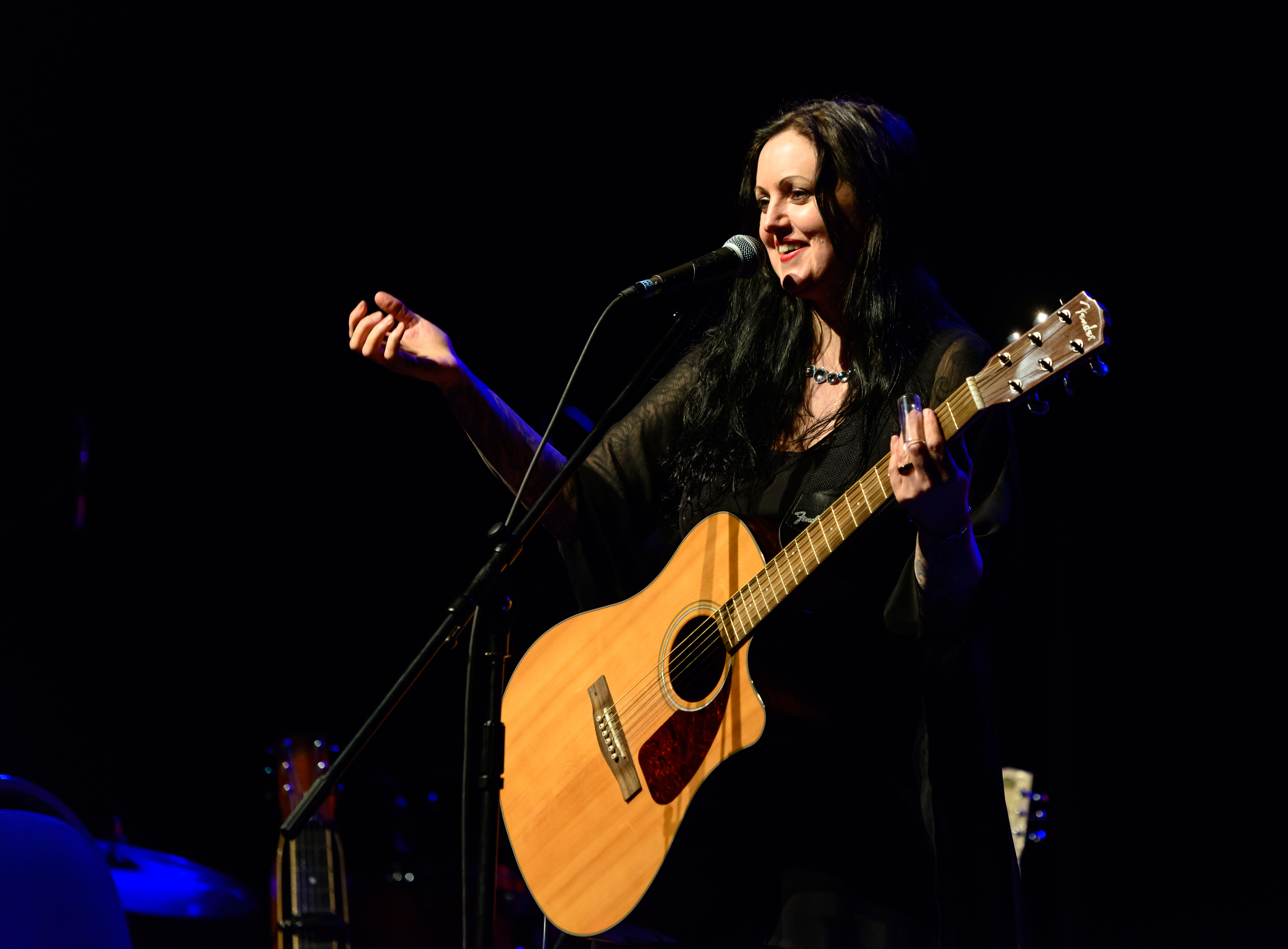 GuitarVirtuosos-Playhouse-BobSteventon-7103